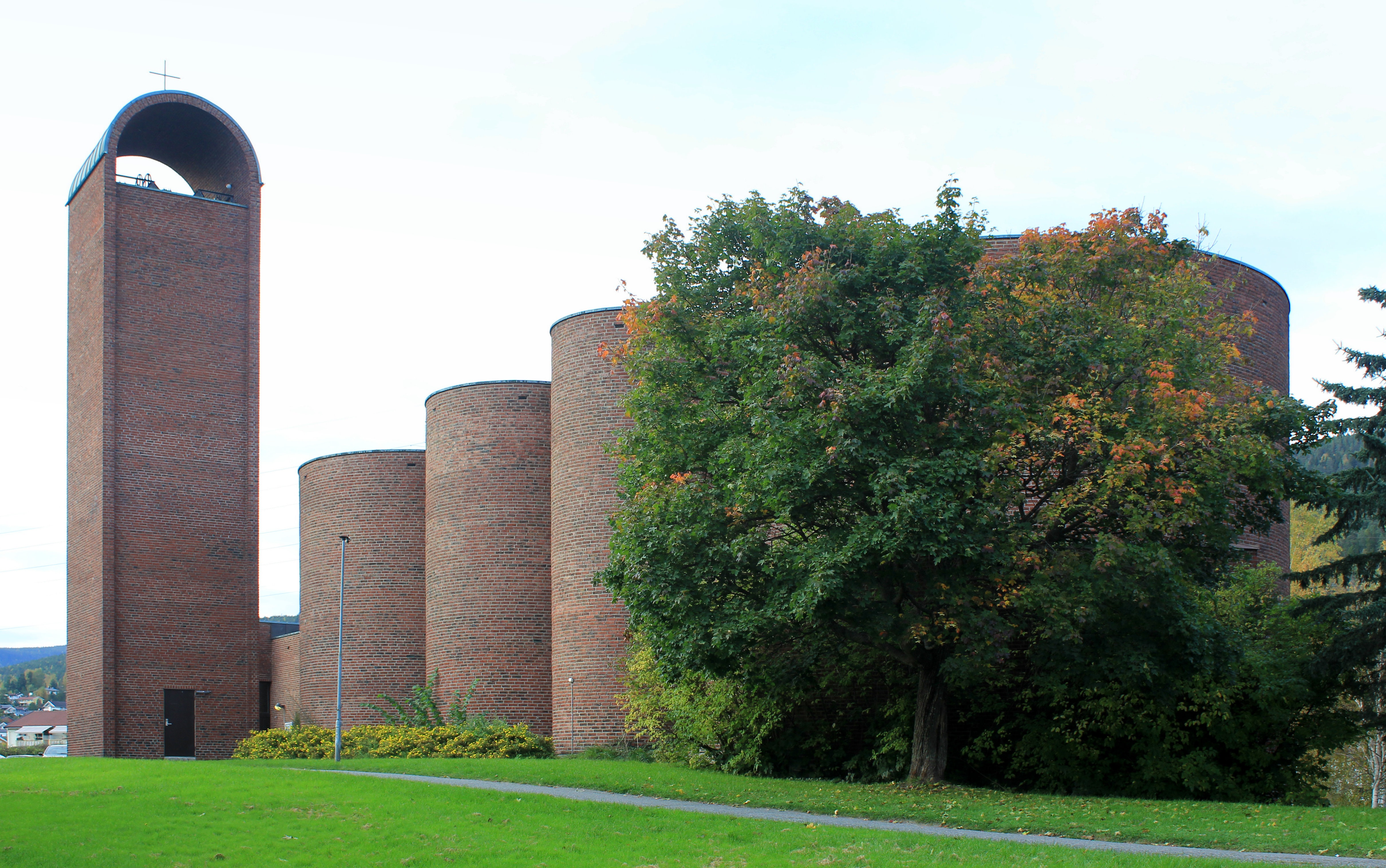 Åssiden kirke er en langkirke fra 1967 i Drammen kommune, Buskerud fylke. Foto tatt fra posisjonen: N59³45'06" E010³09'44" (WGS84).